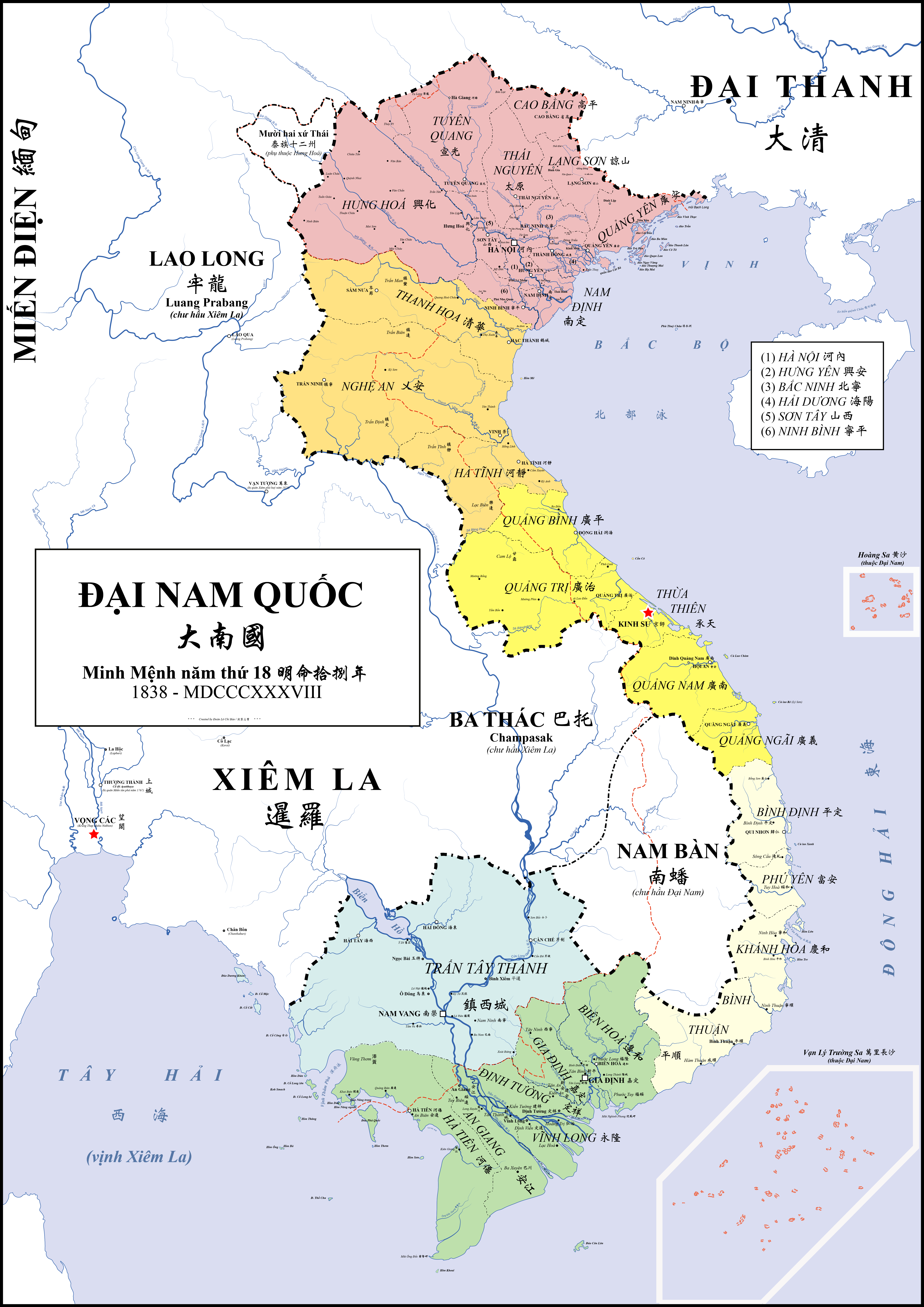 Bản đồ Hành chính nhà Nguyễn vào năm Minh Mạng thứ 18 tức năm 1838. Bắc Kỳ 北圻 bao gồm Hà Nội, Hưng Hóa, Quảng Yên, Hải Dương, Nam Định, Ninh Bình, Tuyên Quang, Lạng Sơn, Cao Bằng. Hữu Kỳ 右圻 bao gồm Thanh Hóa (清化), Nghệ An (乂安), Hà Tĩnh (河靜). Trực Kỳ 直圻 bao gồm Thừa Thiên, Quảng Bình (廣平), Quảng Trị (廣治)), Quảng Nam (廣南), Quảng Ngãi (廣義). Tả Kỳ 直圻 bao gồm Bình Định (平定), Phú Yên (富安), Khánh Hòa (慶和), và Bình Thuận (平順). Nam Kỳ 南圻 bao gồm Biên Hòa (邊和), Gia Định (嘉定), Định Tường (定祥), Vĩnh Long (永隆) và Hà Tiên (河僊).